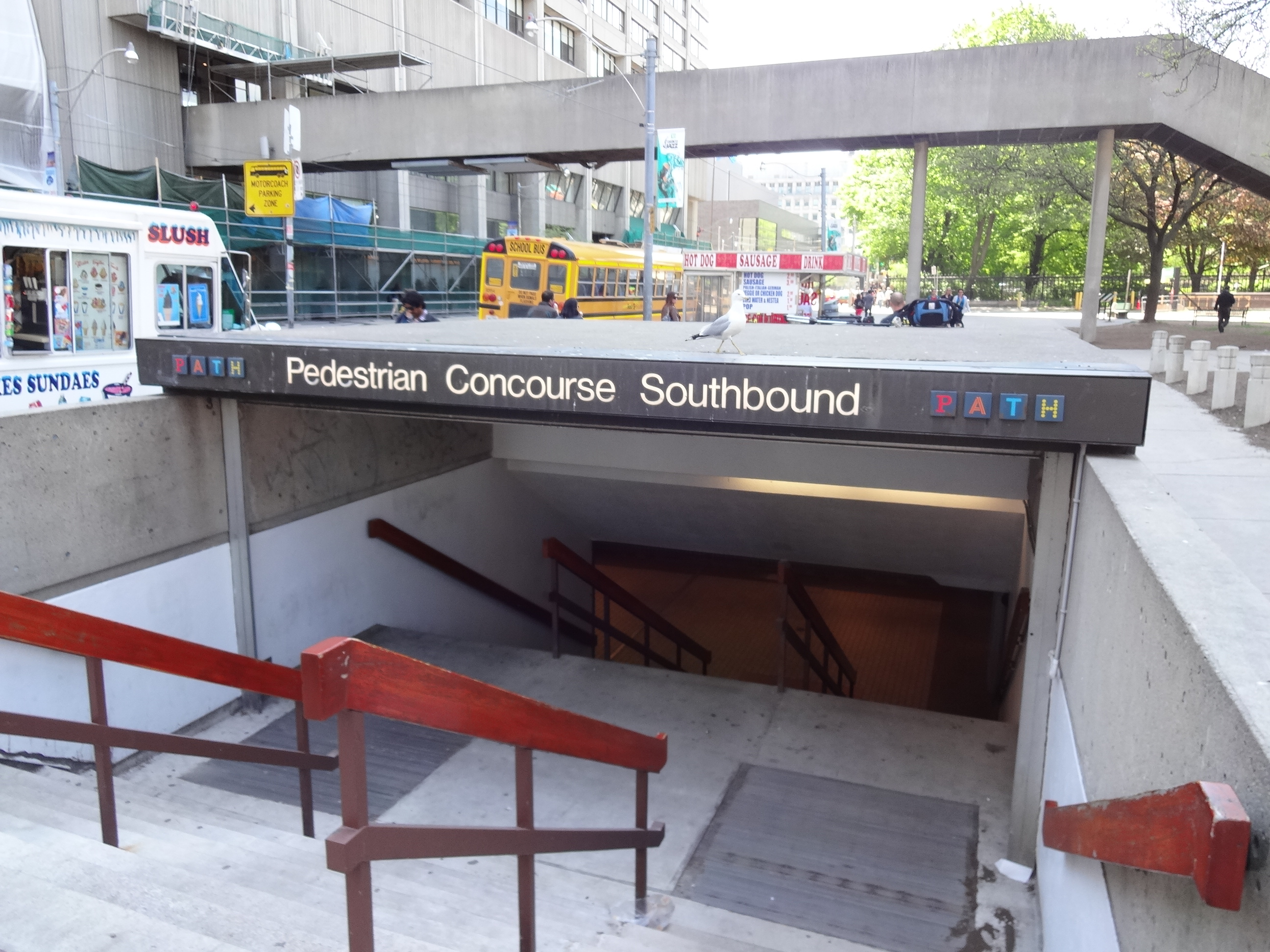 Entrada da PATH em frente ao City Hall, em Toronto.